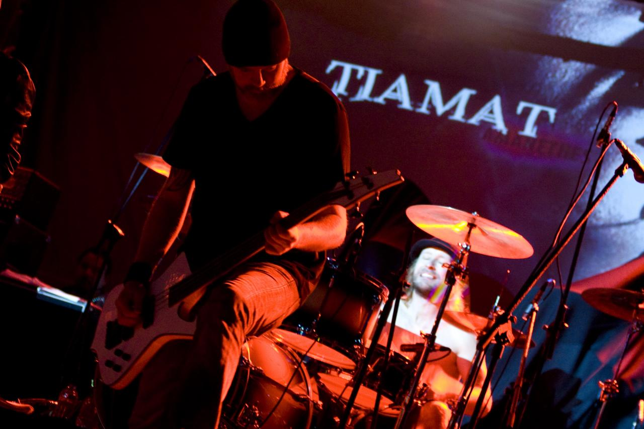 Tiamat @ Carioca Club - 17/11/2009 - São Paulo, Brasil É proibida a cópia ou reprodução deste material sem a autorização do autor. Por favor, não publique nada daqui sem o devido crédito. Fotógrafo: Alexandre Cardoso